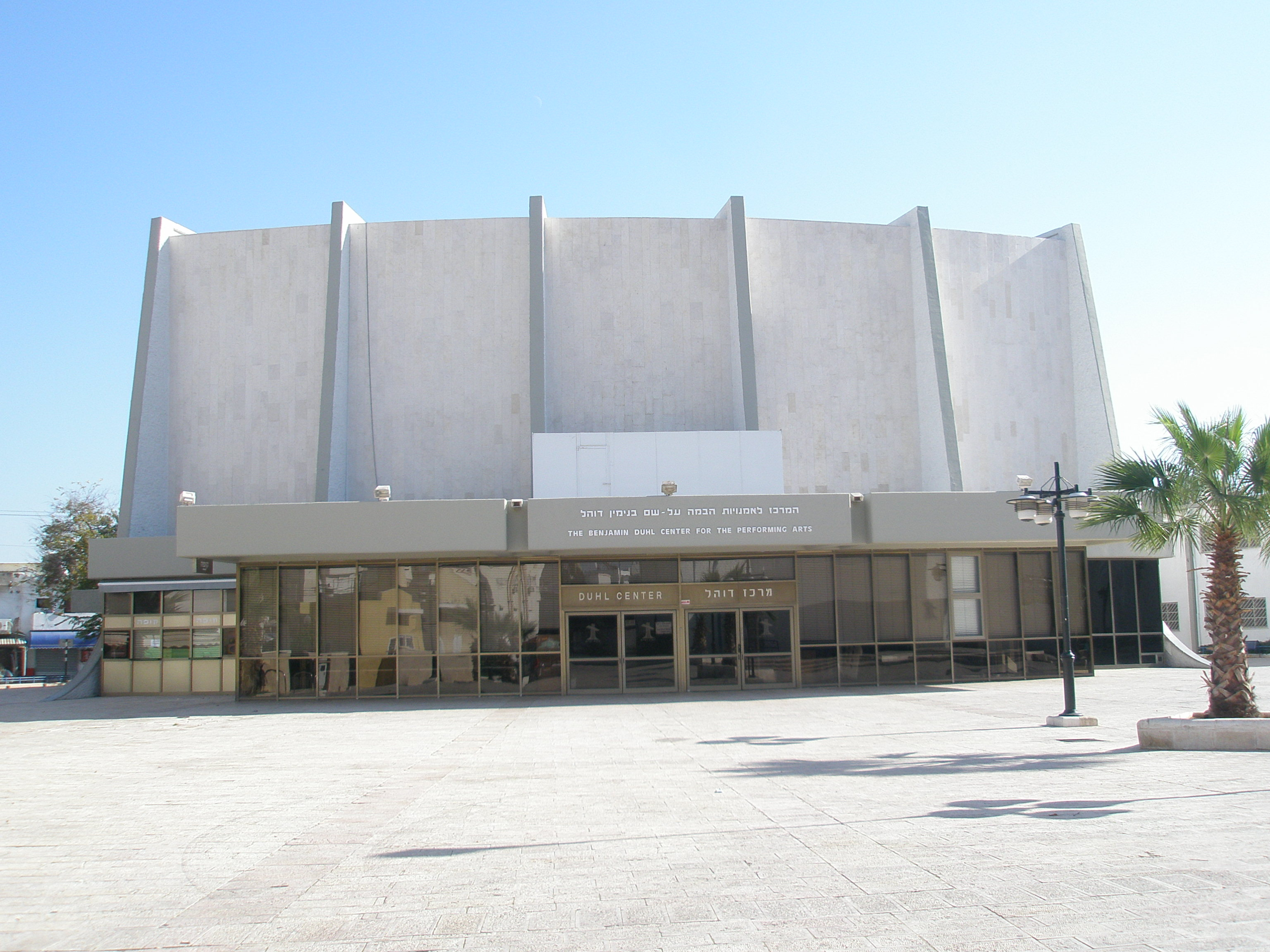 Duhl Center, Shkunat Hatikva, Tel Aviv